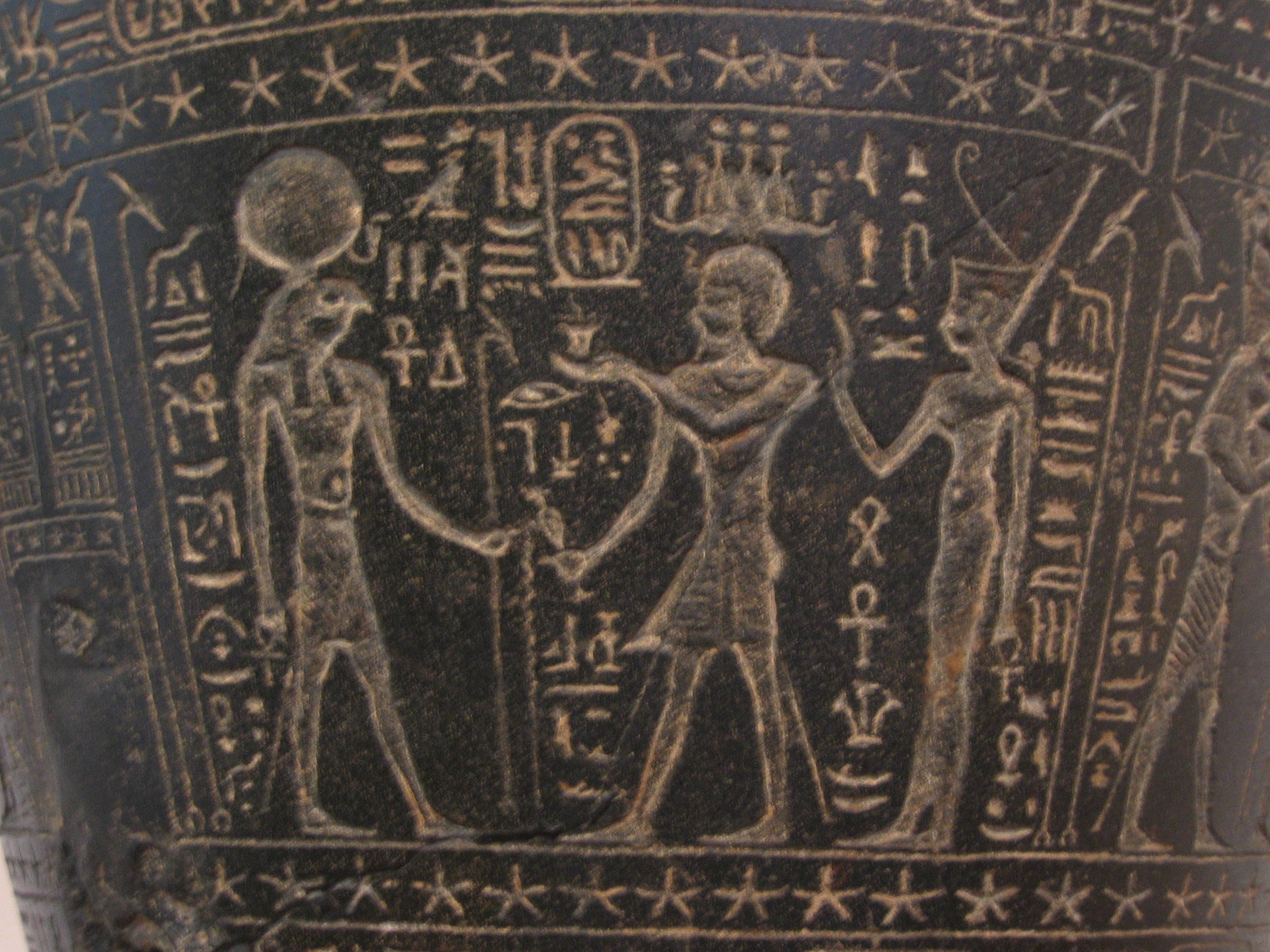 Clessidra ad acqua (particolare), dinastia tolemaica, Tolomeo II Filadelfo, basalto, da Alessandria, ritrovata frammentaria nell'Iseo Campense (Roma).